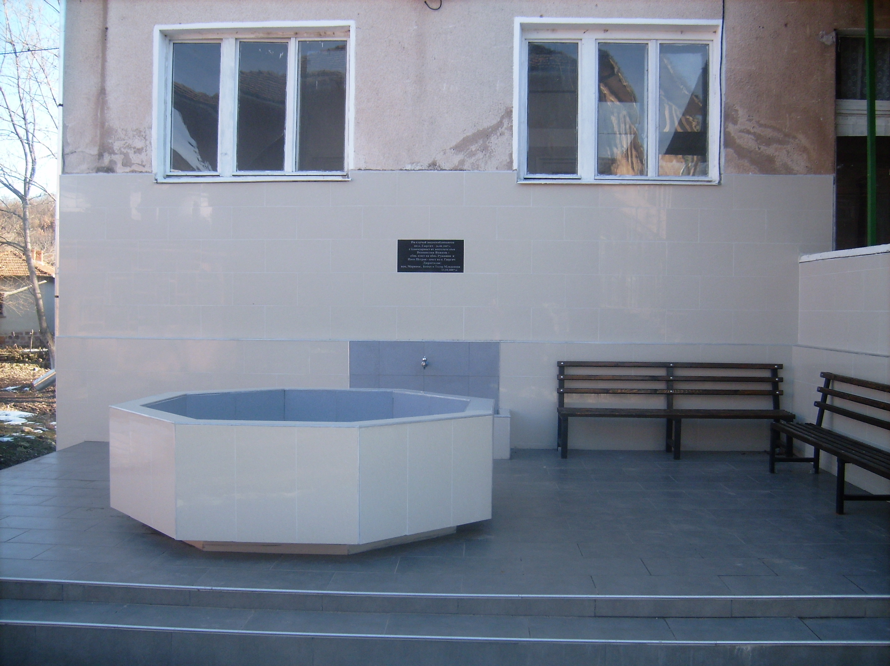 Фонтанът на село Гюргич.Намира се в центъра на селото.открт на 13 октомври 2007 година.